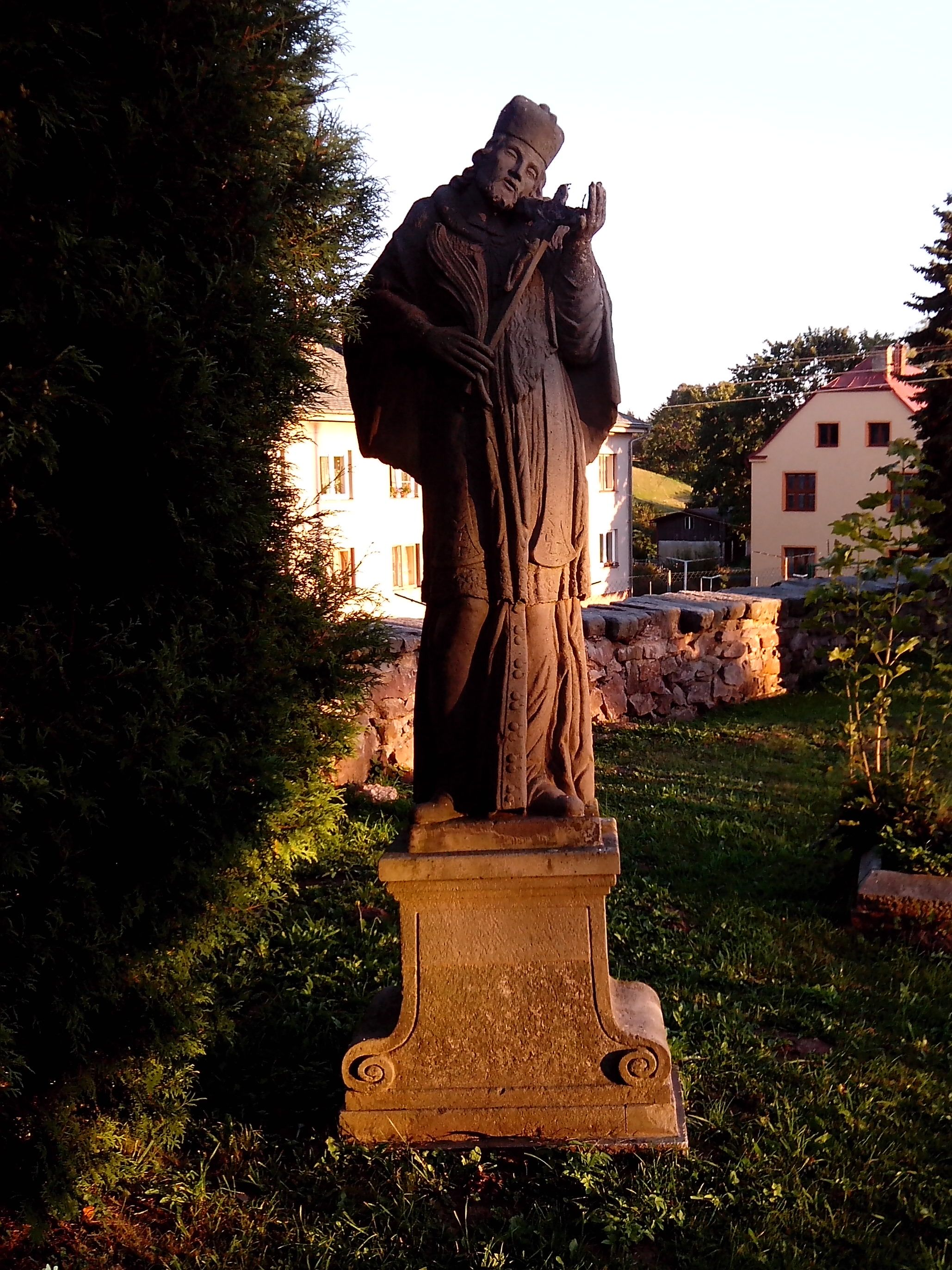 Hřbitov ve Vižňově